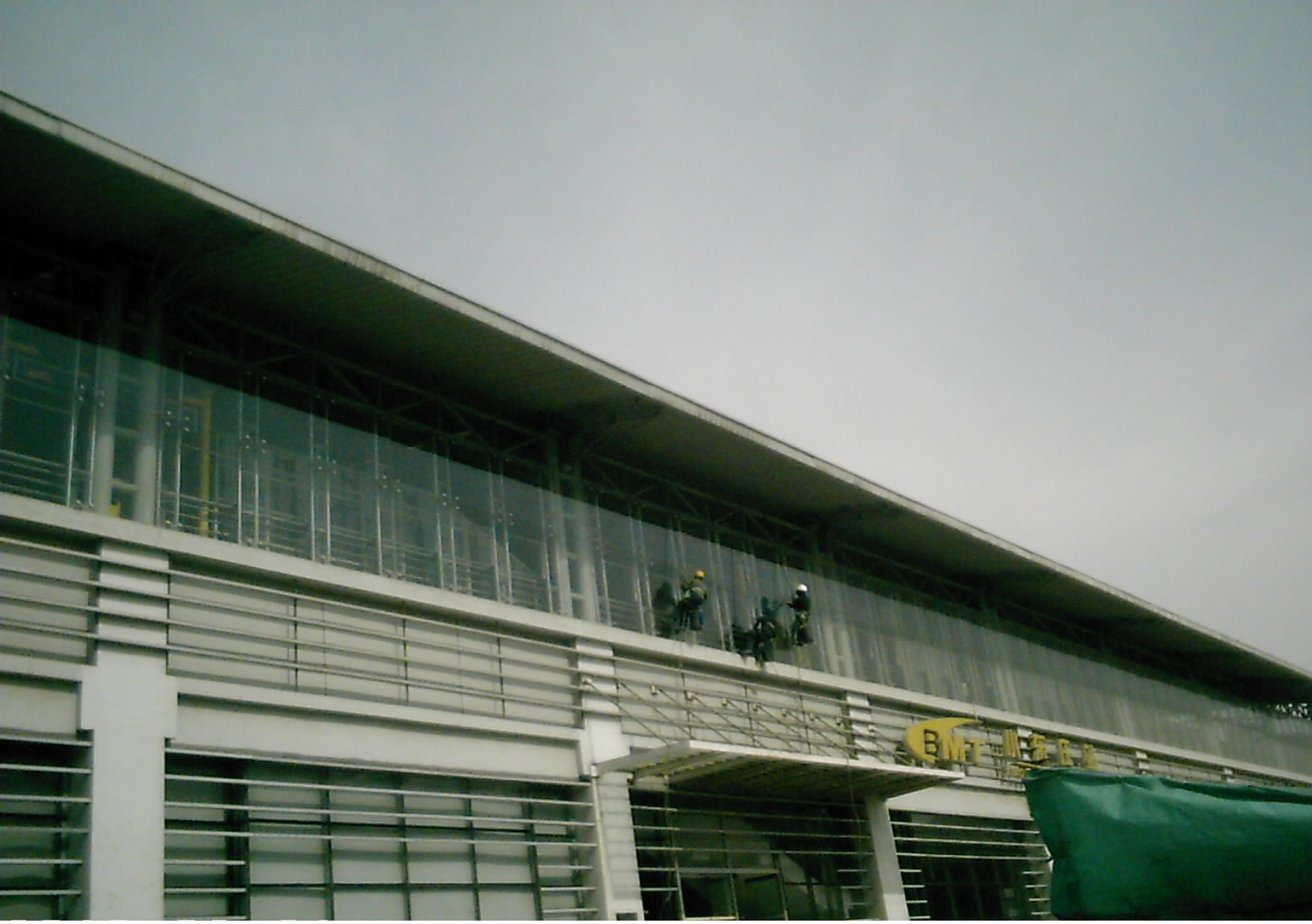 天津地铁九号线小东庄站